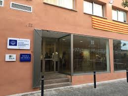 Es la fila